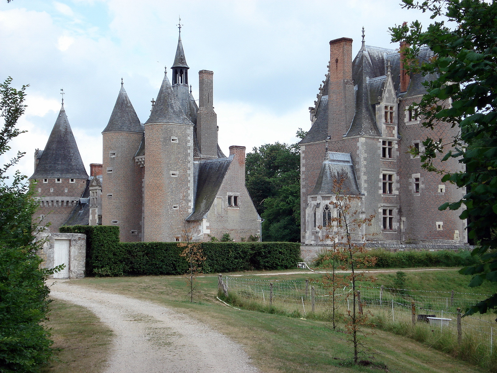 Château du Moulin, commune de Lassay-sur-Croisne, Sologne.